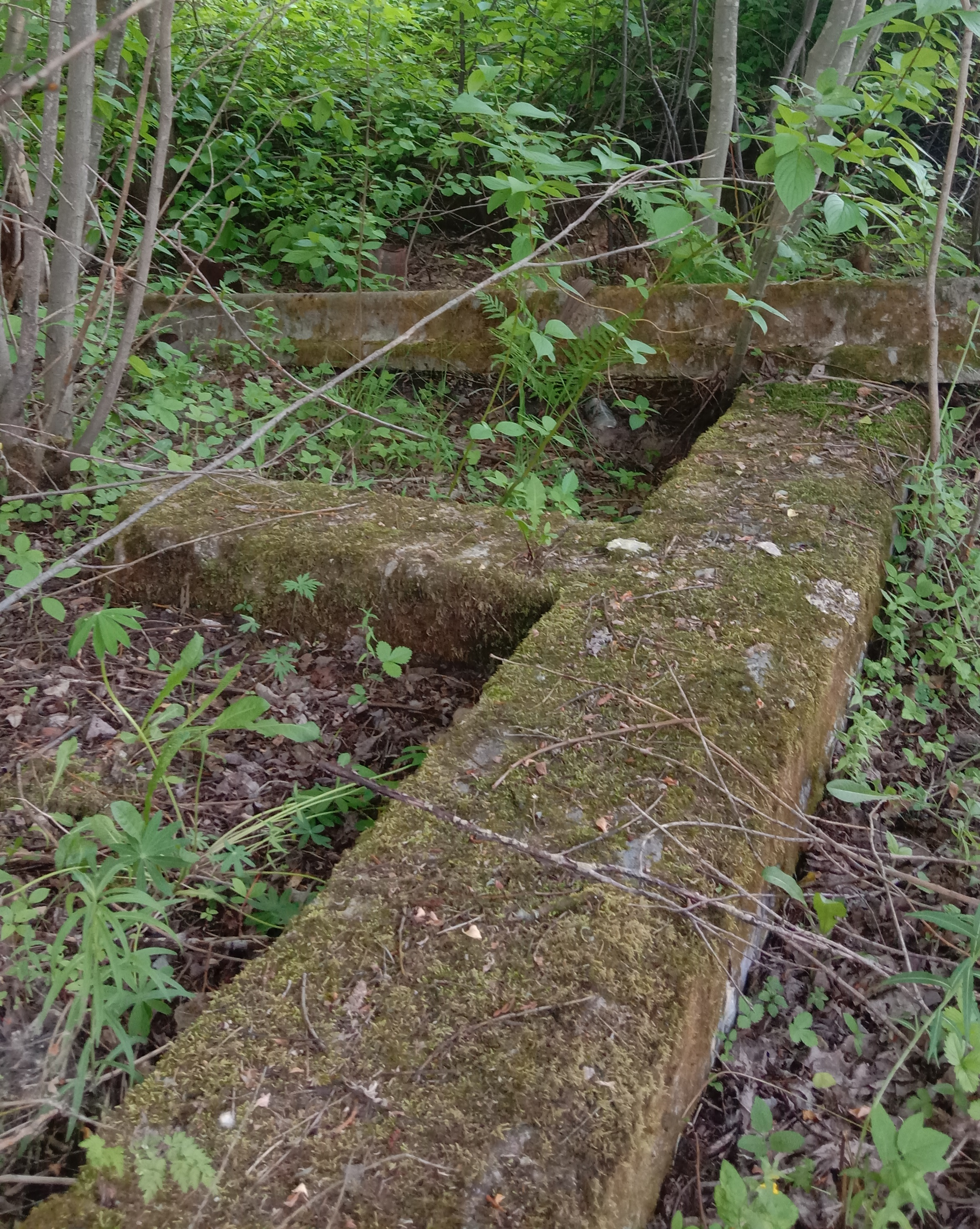 пл. Молодёжная, фундамент